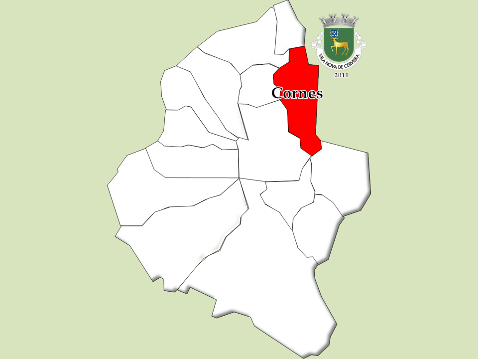 Censos 1864/2011